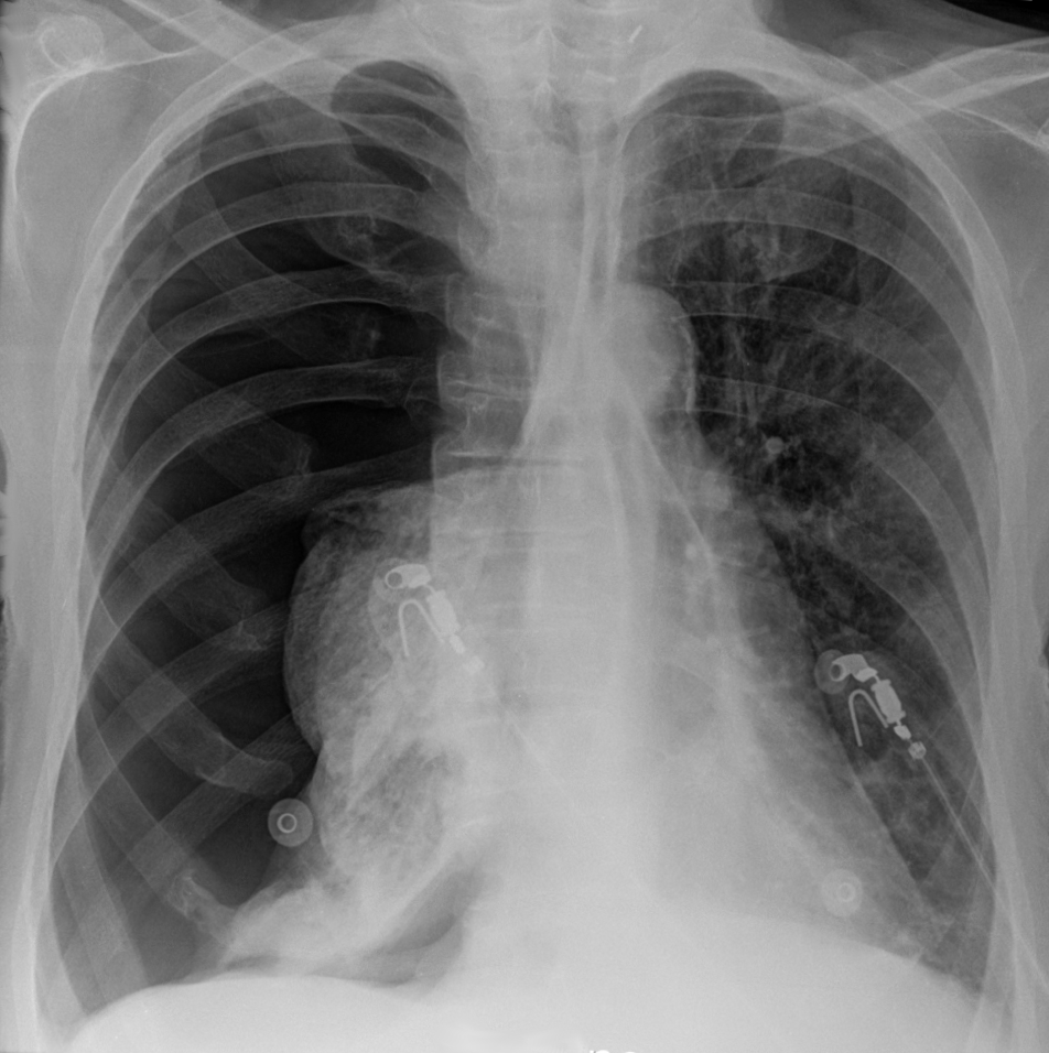 Pneumothorax im Thoraxröntgen.